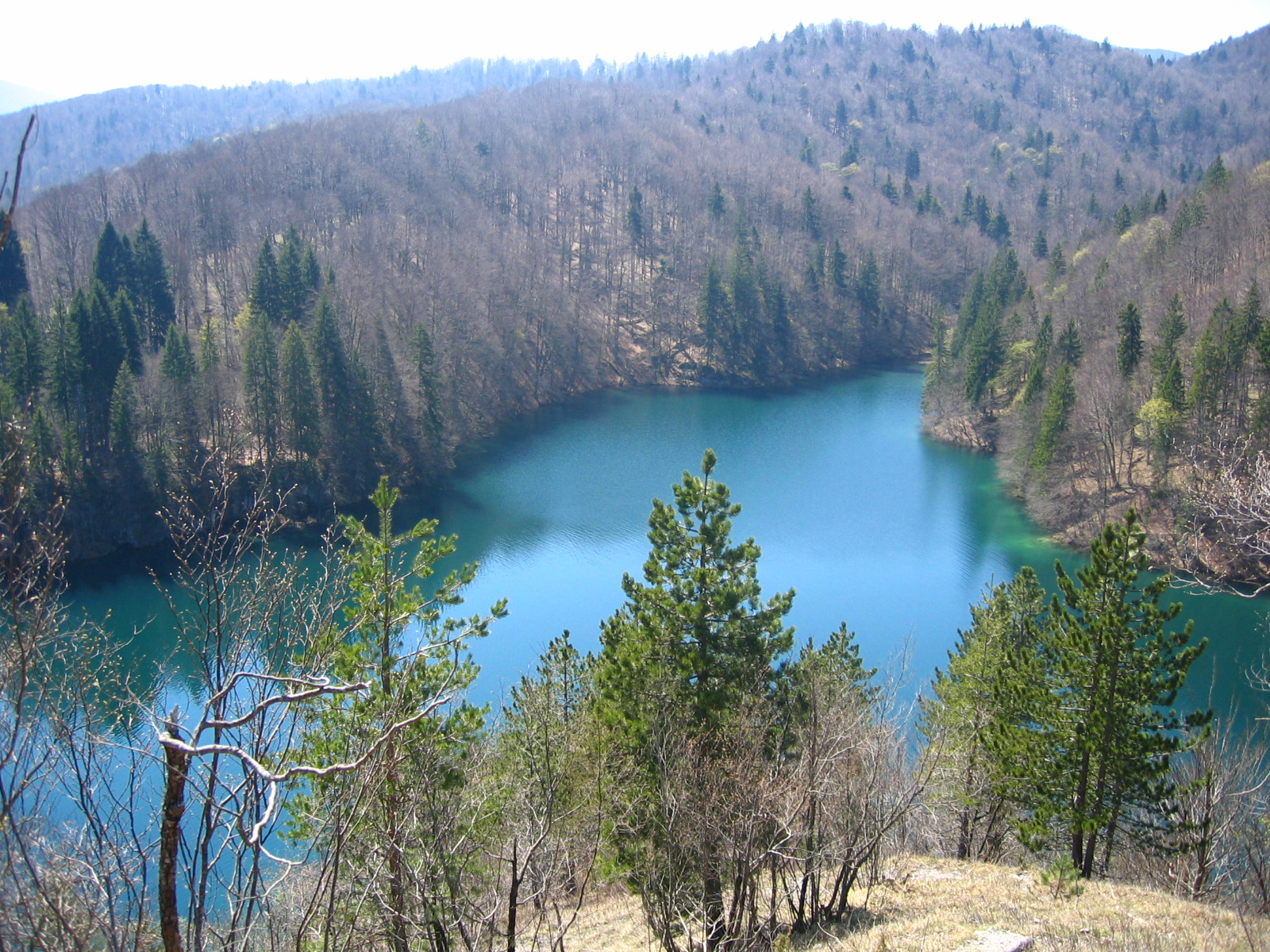 National Park Plitvice Lakes (Croatia), Gradinsko jezero